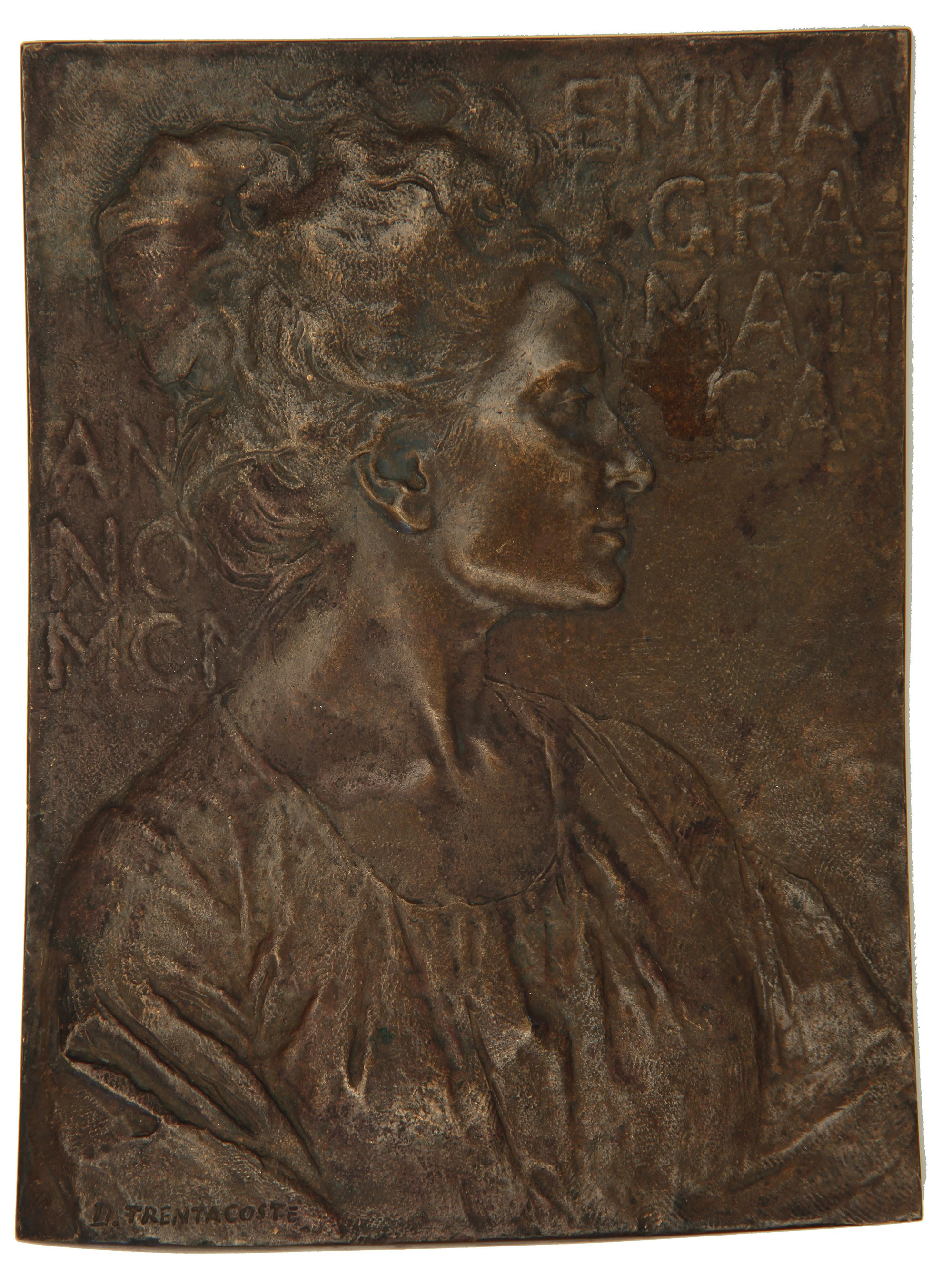 Domenico Trentacoste, EMMA GRAMATICA. Siglo XIX. 13 x 9,6 cm, modelado y vaciado de cobre. Inv. 11227.